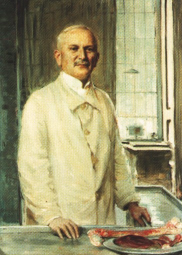 Bildnis Georg Schmorl